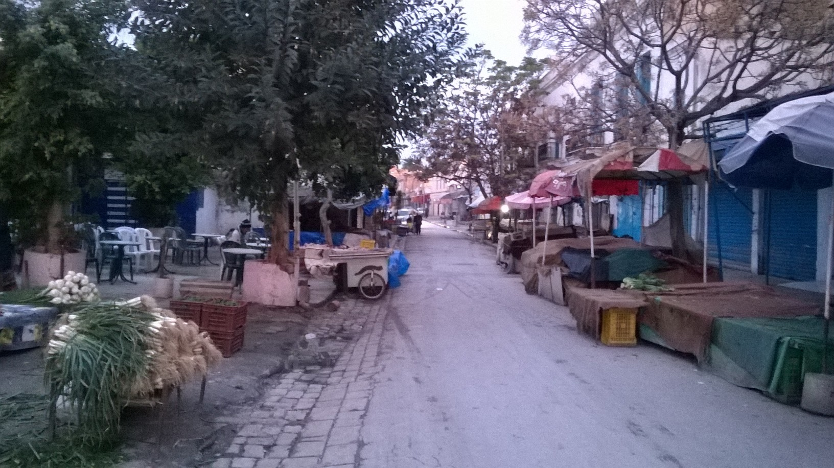 Sidi El Béchir , Tunis سيدي البشير ، تونس